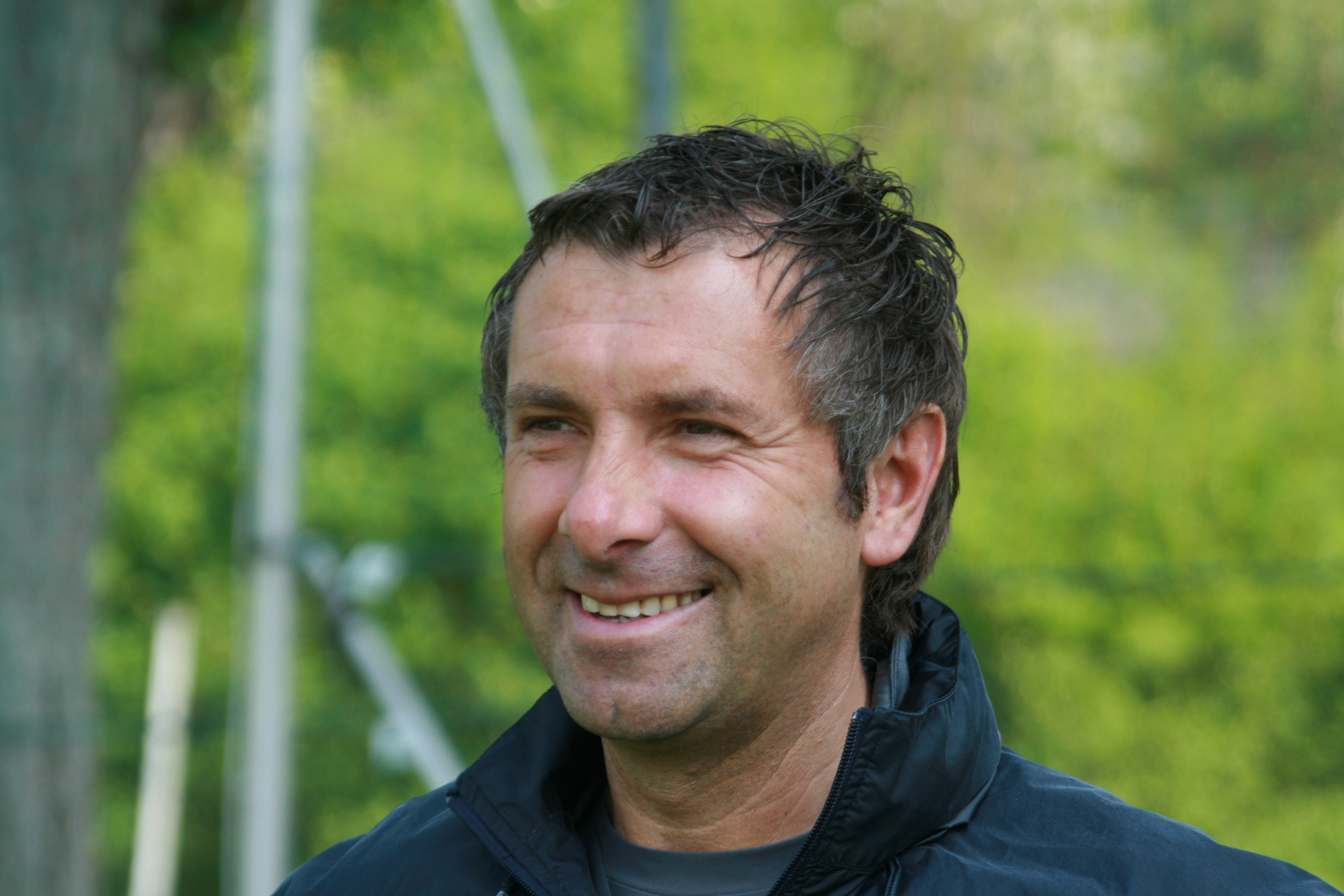 Franz Lederer - SV Mattersburg (Bild 3)